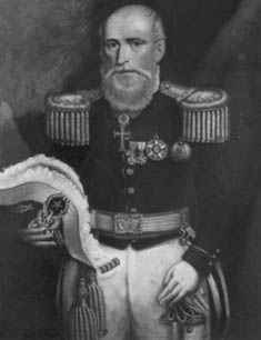 Obra da coleção Brasiliana Iconográfica.